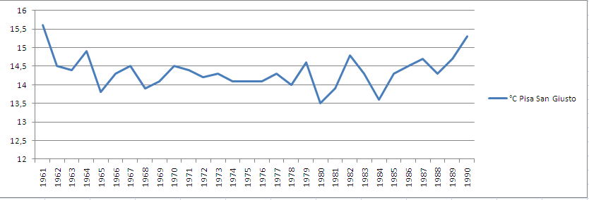 Stazione meteorologica di Pisa San Giusto: andamento della temperatura media annua dal 1961 al 1990